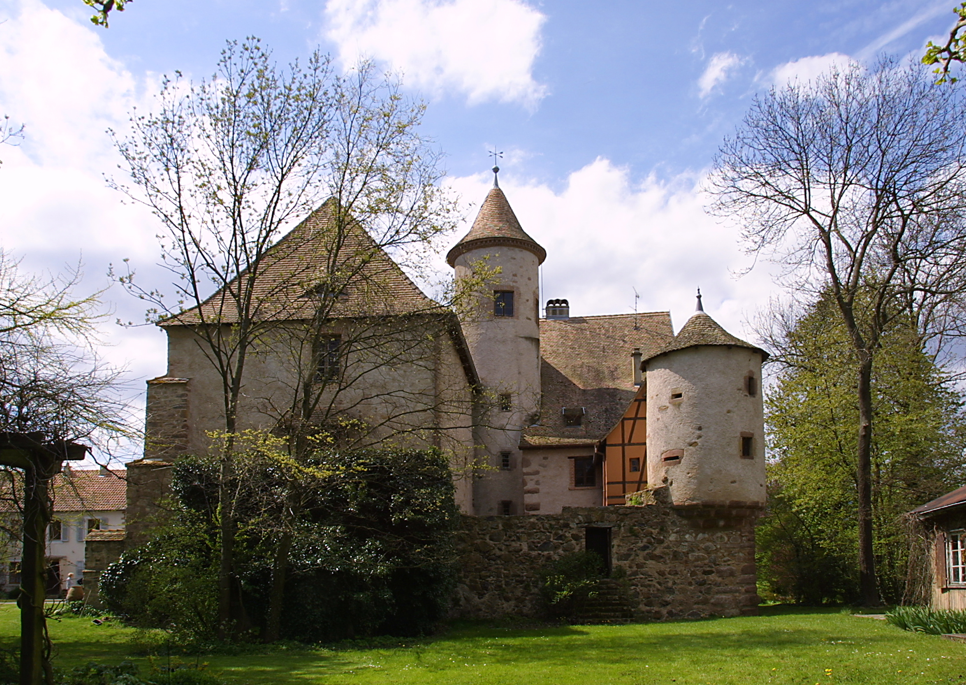 Vue sud est de la partie arrière du château de Hartmannswiller. Tourelle, tour en poivrière, canonnière à lunettes, chaînage d'angle en pierre à bossage, chemin de ronde démontrent son passé militaire.